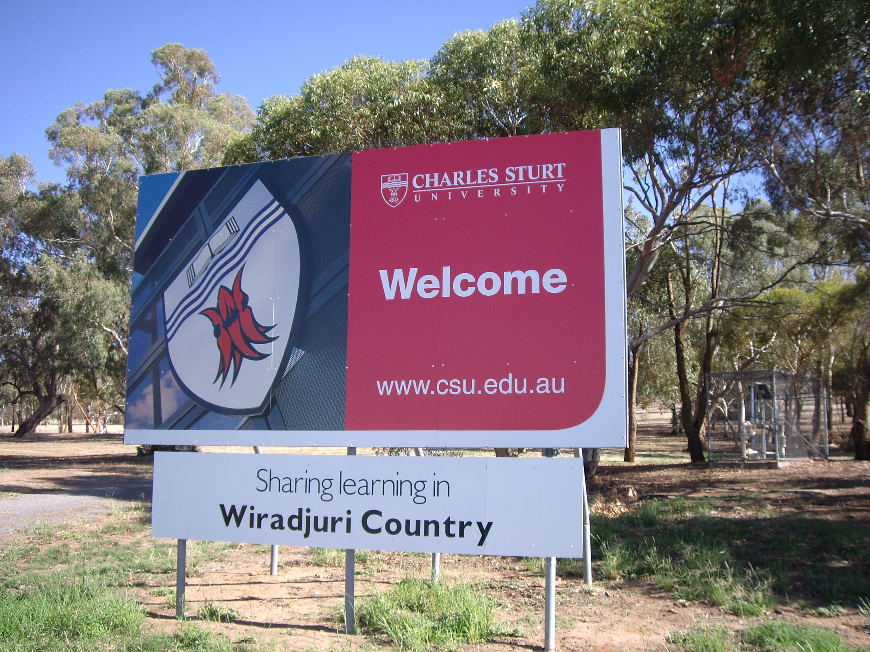 CSU Welcome sign near entrance to Wagga Wagga Campus